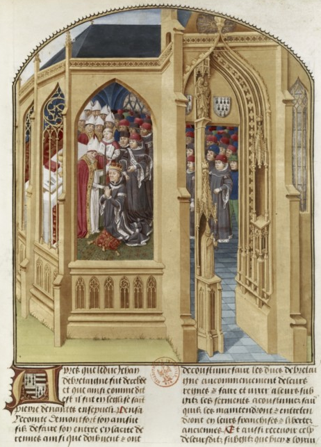 Couronnement de François Ier de Bretagne. Lettre aux armes de Jean de Derval